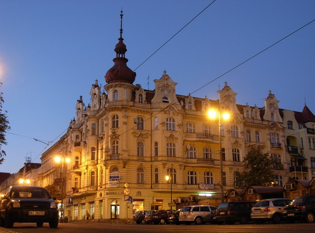 Kamienica neobarokowa Plac Wolności 1 (1896 r.) o zmierzchu